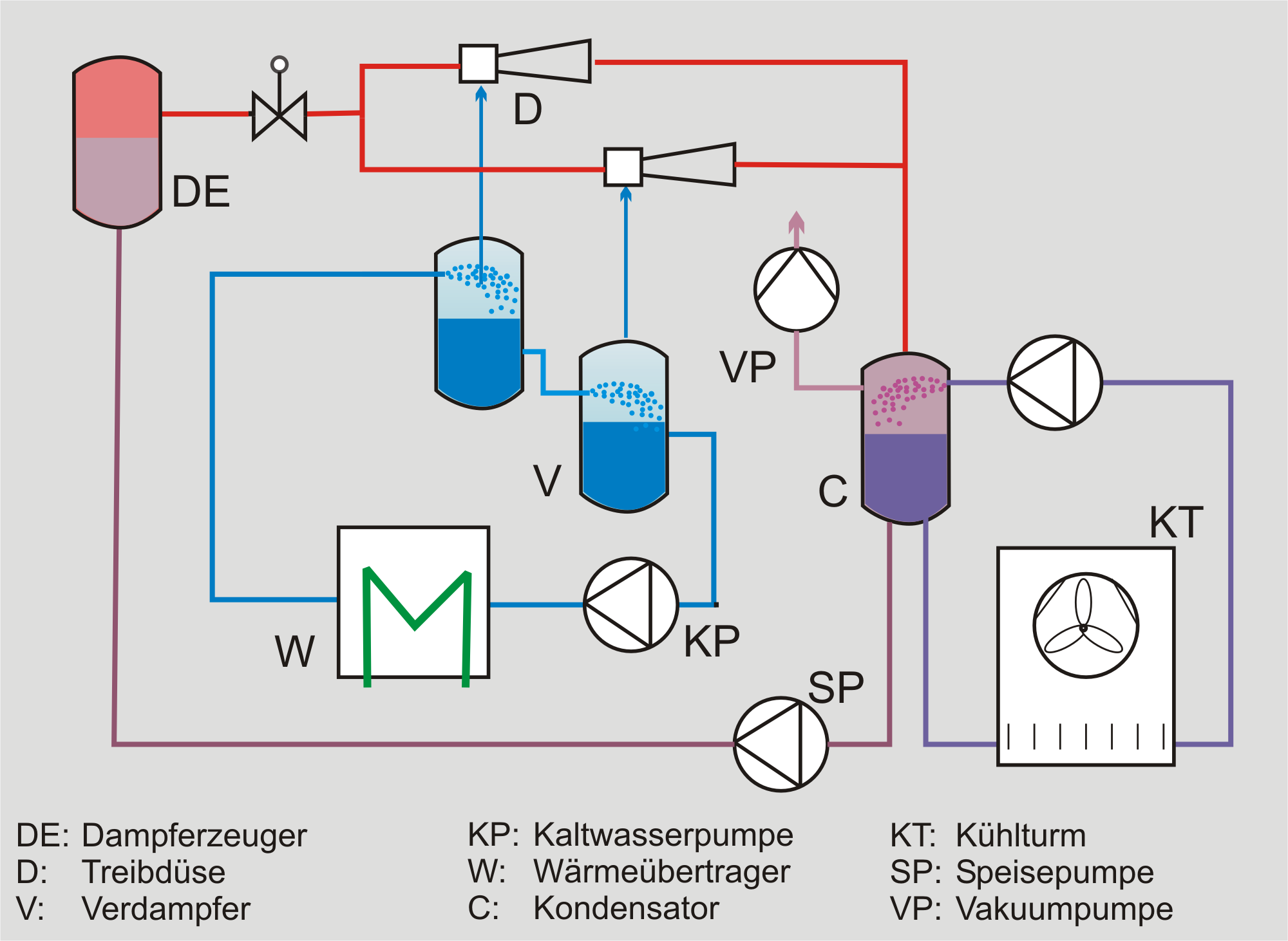 RI-Fließbild einer zweistufigen Dampfstrahlkälteanlage